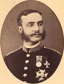 Alfons XII van Spanje, gestorven in 1885